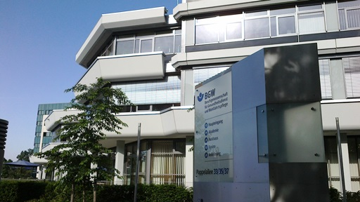 Hauptverwaltung der Berufsgenossenschaft für Gesundheitsdienst und Wohlfahrtspflege, kurz BGW, in der Pappelallee, Hamburg